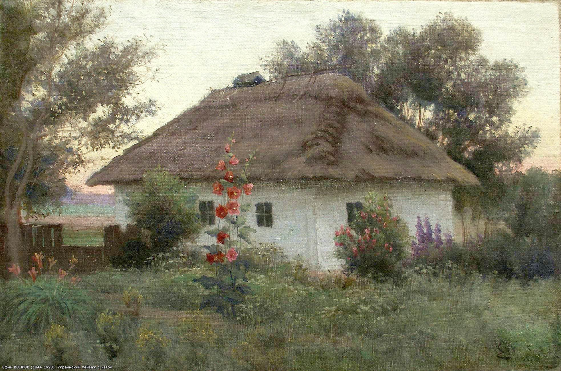 Ukrainian landscapelabel QS:Lru,"Украинский_пейзаж" label QS:Luk,"Український пейзаж" label QS:Len,"Ukrainian landscape"